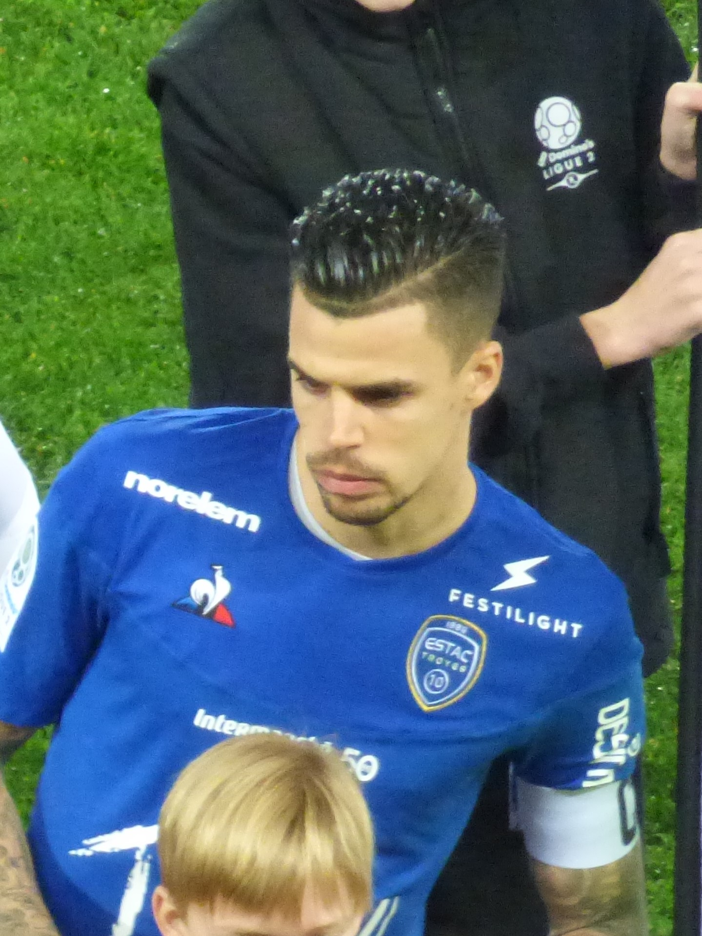 Jimmy Giraudon lors du match RC Lens / ES Troyes AC, comptant pour la vingt-troisième journée du championnat de France de football de Ligue 2 2019-2020, le 4 février 2020, au Stade Bollaert-Delelis de Lens